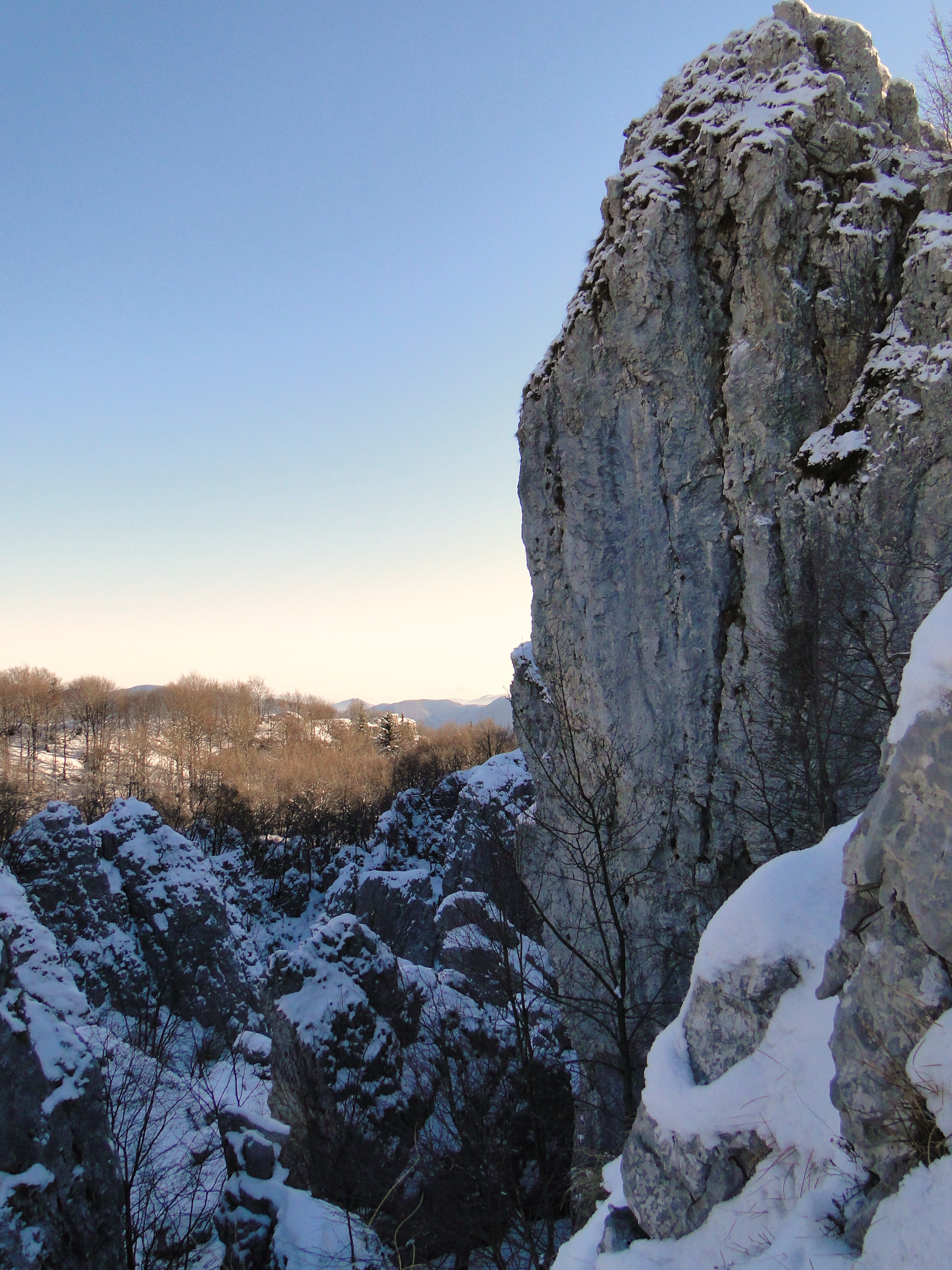 Torrioni del monte Cornagera, Aviatico (BG), Italia